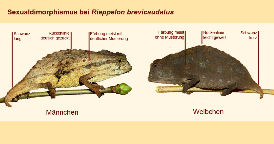 Grafik zum Sexualdimorphismus von Rieppeleon brevicaudatus